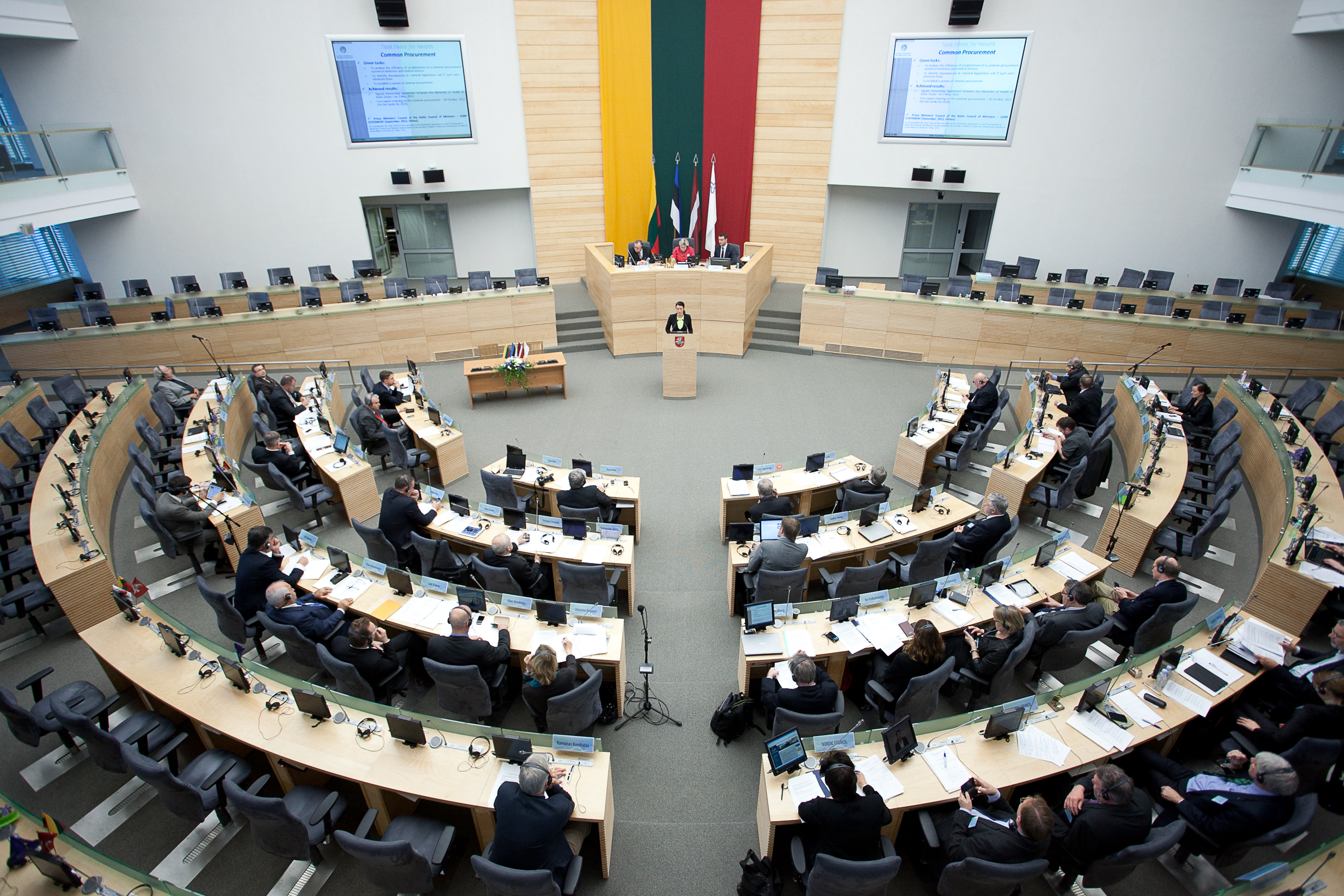 2012.gada 9.novembris. Saeimas deputāti piedalās Baltijas Asamblejas 31.sesijā, kas šogad notiek Lietuvas galvaspilsētā Viļņā. Foto: Ernests Dinka, Saeimas Kanceleja